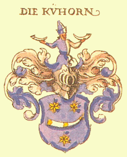 Wappen der Frankfurter Patrizierfamilie Kühorn